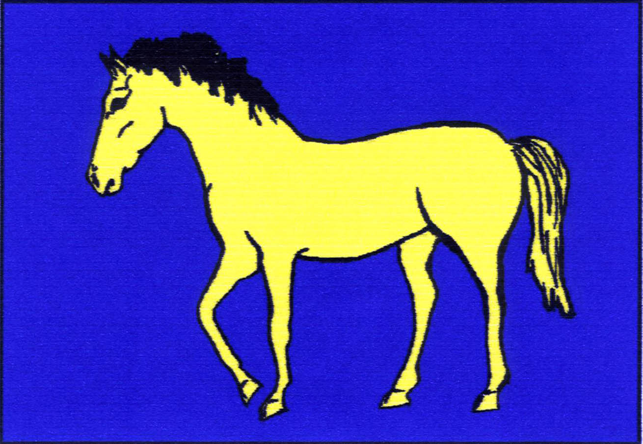 Vlajka obce Borač